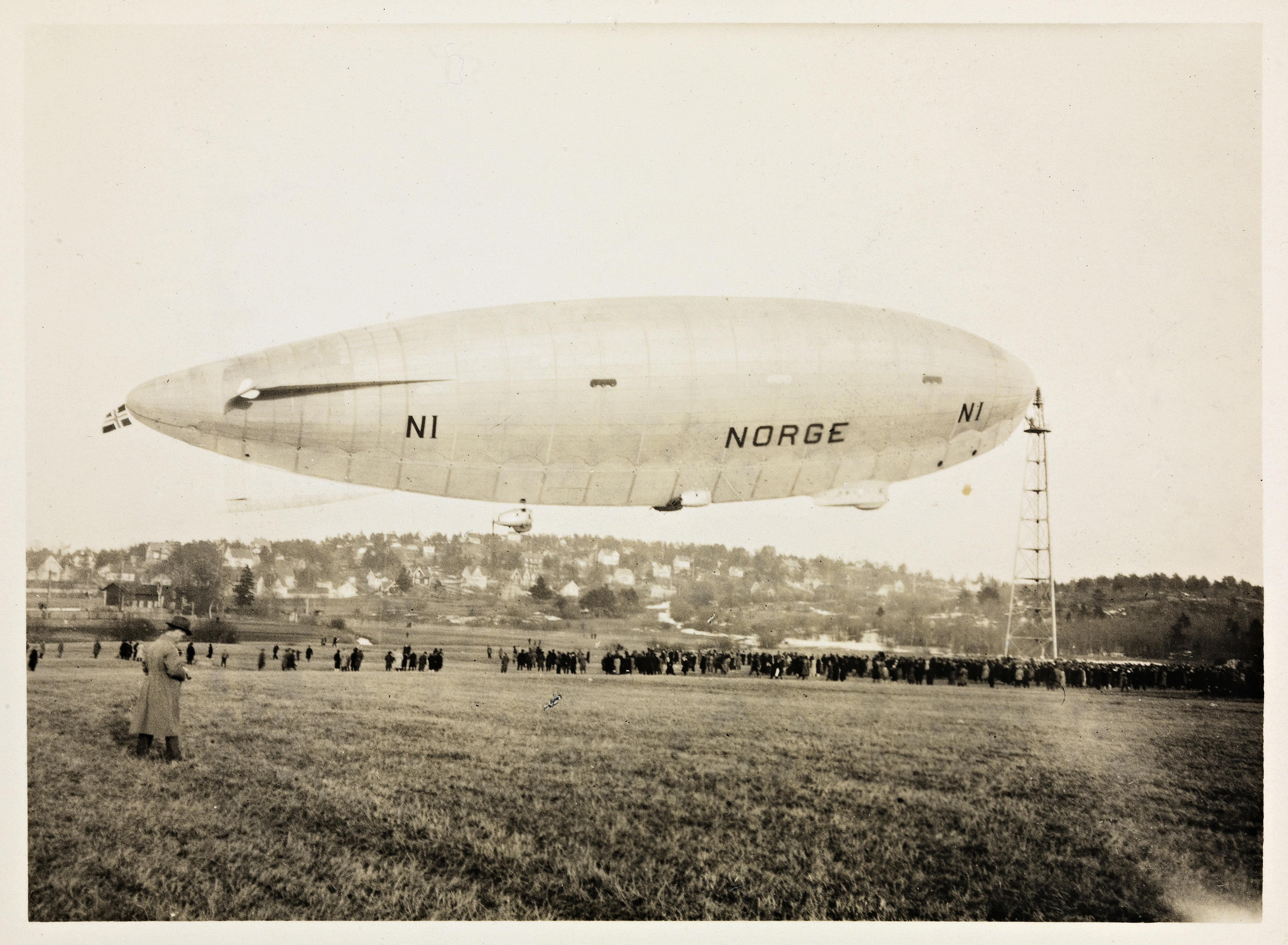 Tittel / Title: Luftskipet "Norge" ved fortøyningsmasten på Ekeberg Beskrivelse / Description: Gelatin papirpositiv. Dato / Date: 14. april 1926. Fotograf / Photographer: ukjent / unknown Sted / Place: Oslo, Ekeberg Eier / Owner Institution: Nasjonalbiblioteket / National Library of Norway Lenke / Link: Bildesignatur / Image Number: bldsa_NPRA0816